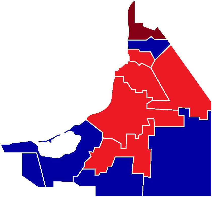 Resultados de las elecciones municipales del Estado de Campeche